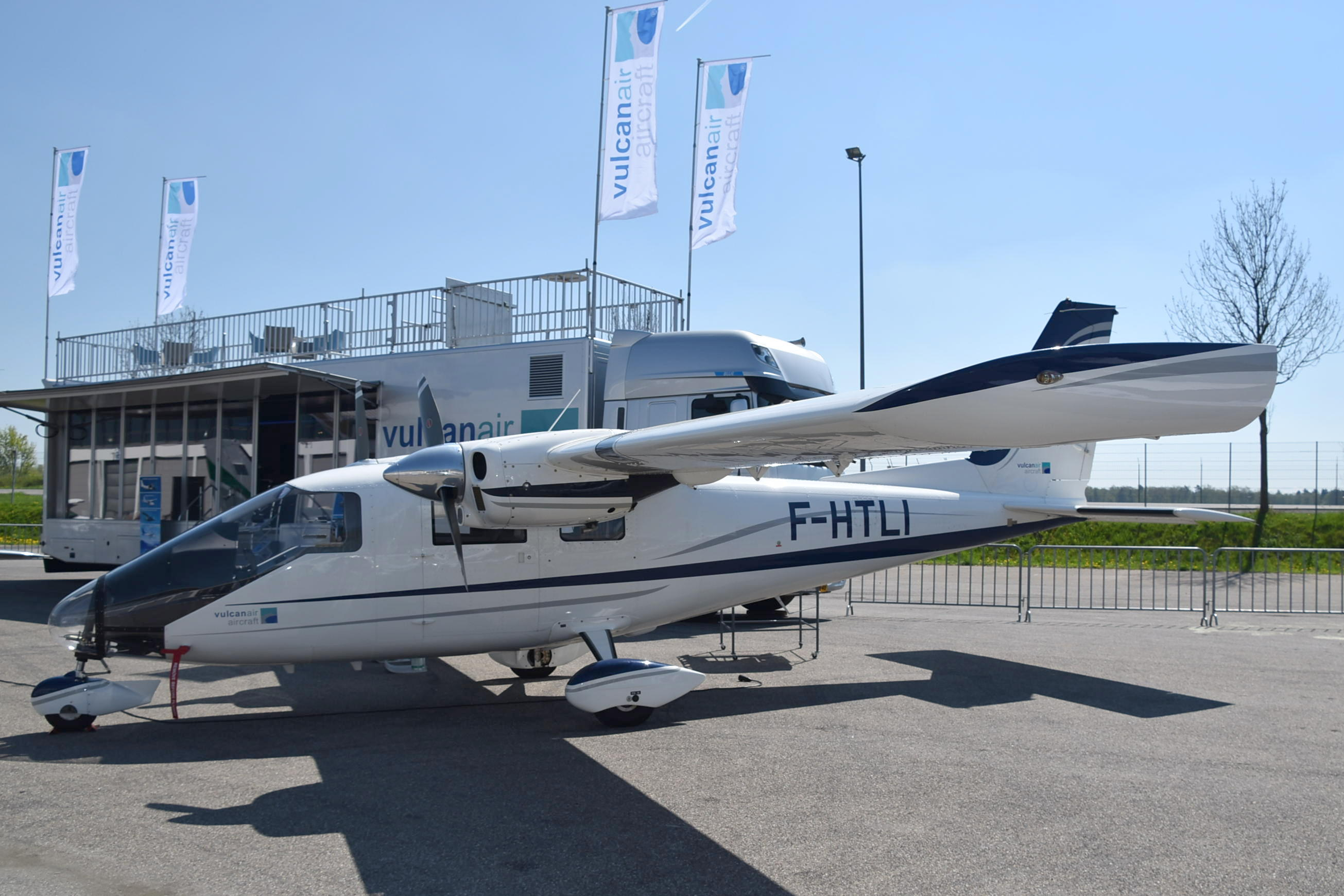 Partenavia P.68 at Aero2016,Messe Friedrichshafen, Germany, 20/04/16.